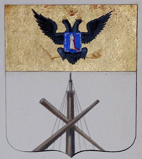 Беларуская (тарашкевіца): Бабруйск (Babrujsk). Расейскі герб места